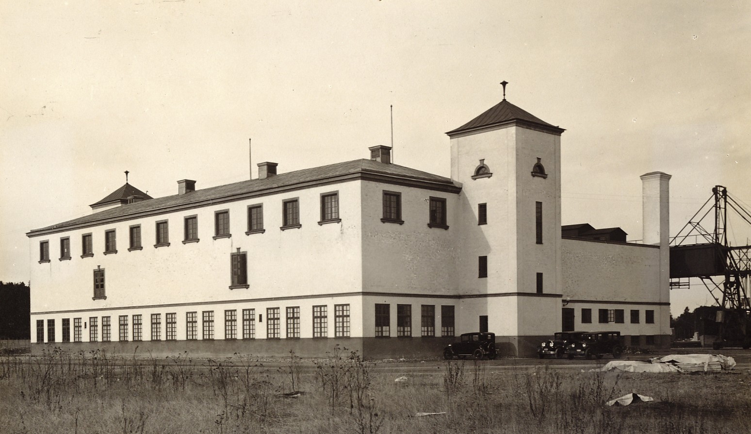 Banan-Kompaniets nya byggnad i Frihamnen i Stockholm 1928